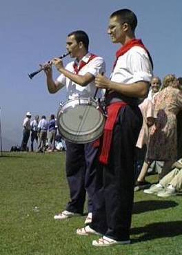 groupe folkorique en Cantabrie (Espagne). Virgen del Moral (1er samedi après le 15 aout). Caisse claire et clarinette Mib (système de clefs limité).